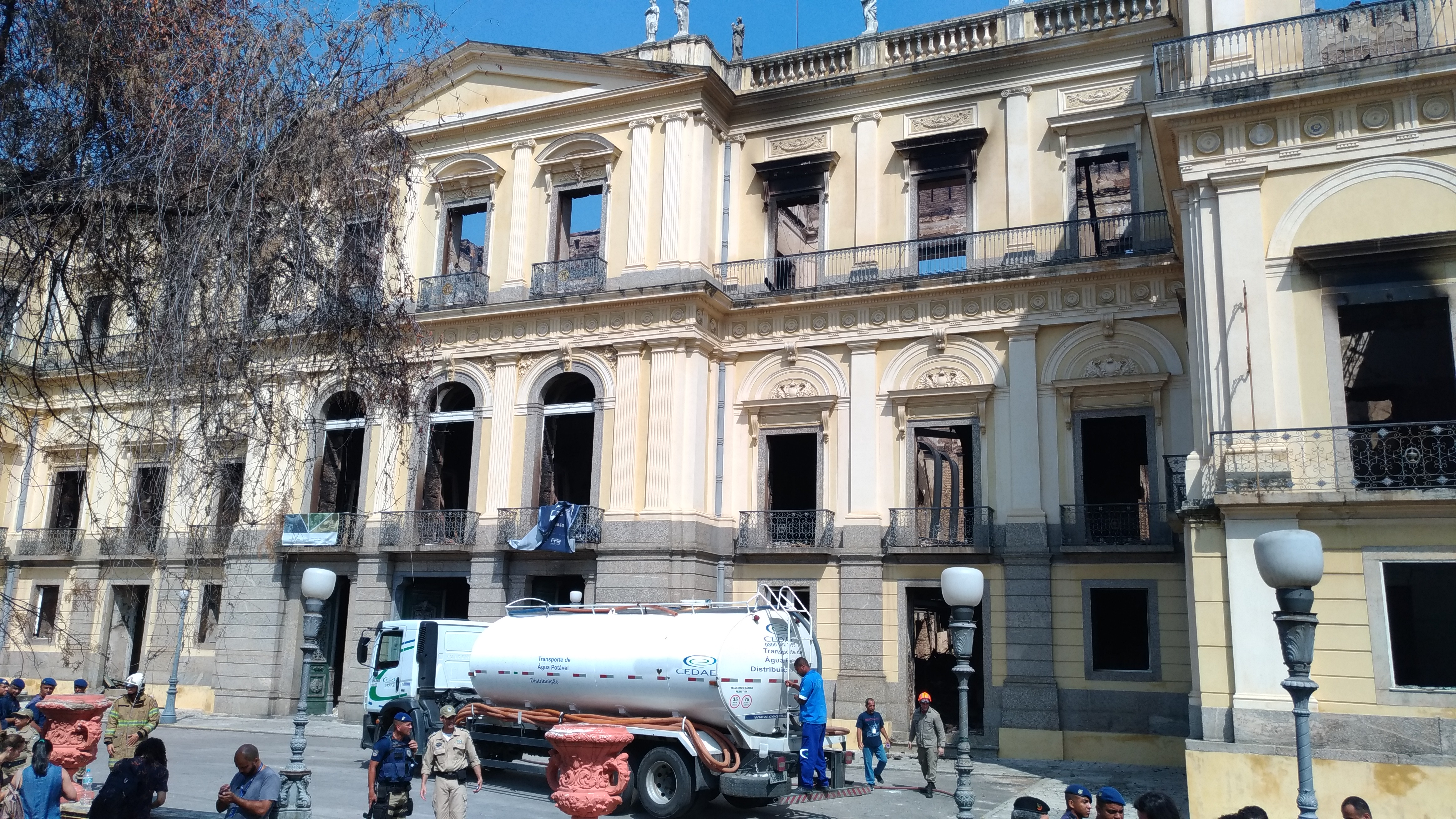 Fachada com caminhão pipa